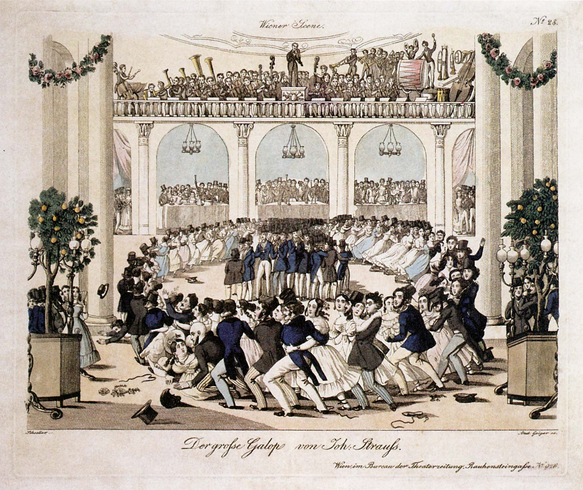 Kolorierter Kupferstich zu "Der große Galopp von Joh. Strauß" (Johann Strauss Vater). Stich von Andreas Geiger nach Johann Christian Schoeller.